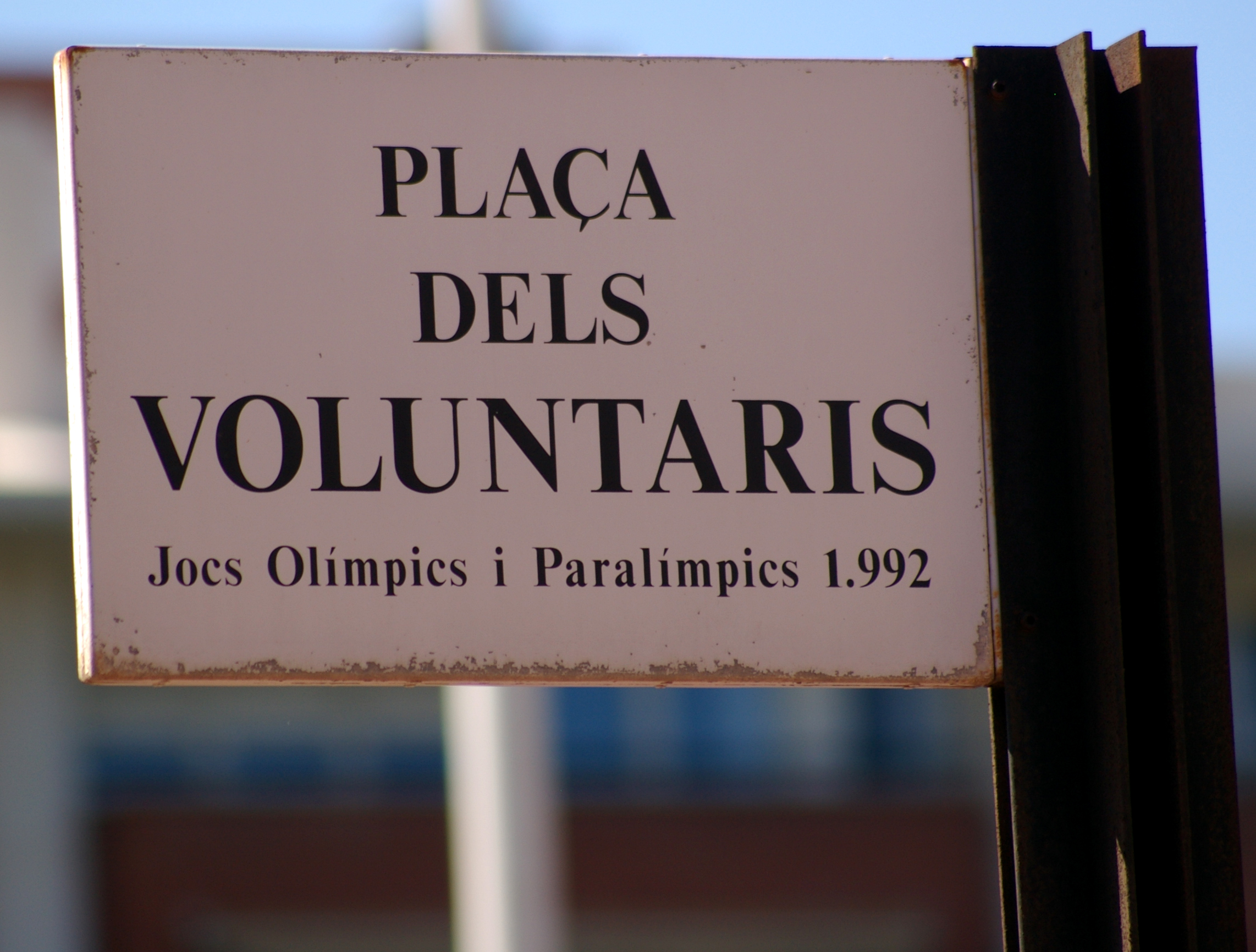 Plaça dels Voluntaris (Barcelona, Catalunya).